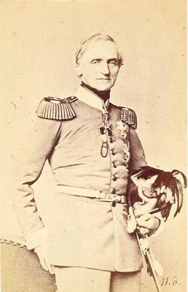 Johann (Sachsen)